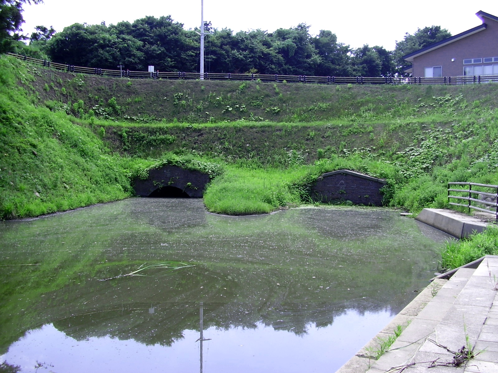 宮城県宮城郡松島町にある元禄潜穴の穴頭（入口）。品井沼の干拓を目的として江戸時代に開削された。2007年、品井沼干拓関連施設の一つとして土木学会選奨土木遺産に認定された。撮影日 2011年8月9日